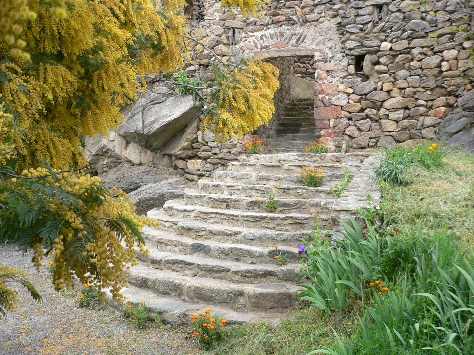 Située à proximité du Prieuré de Marcevol